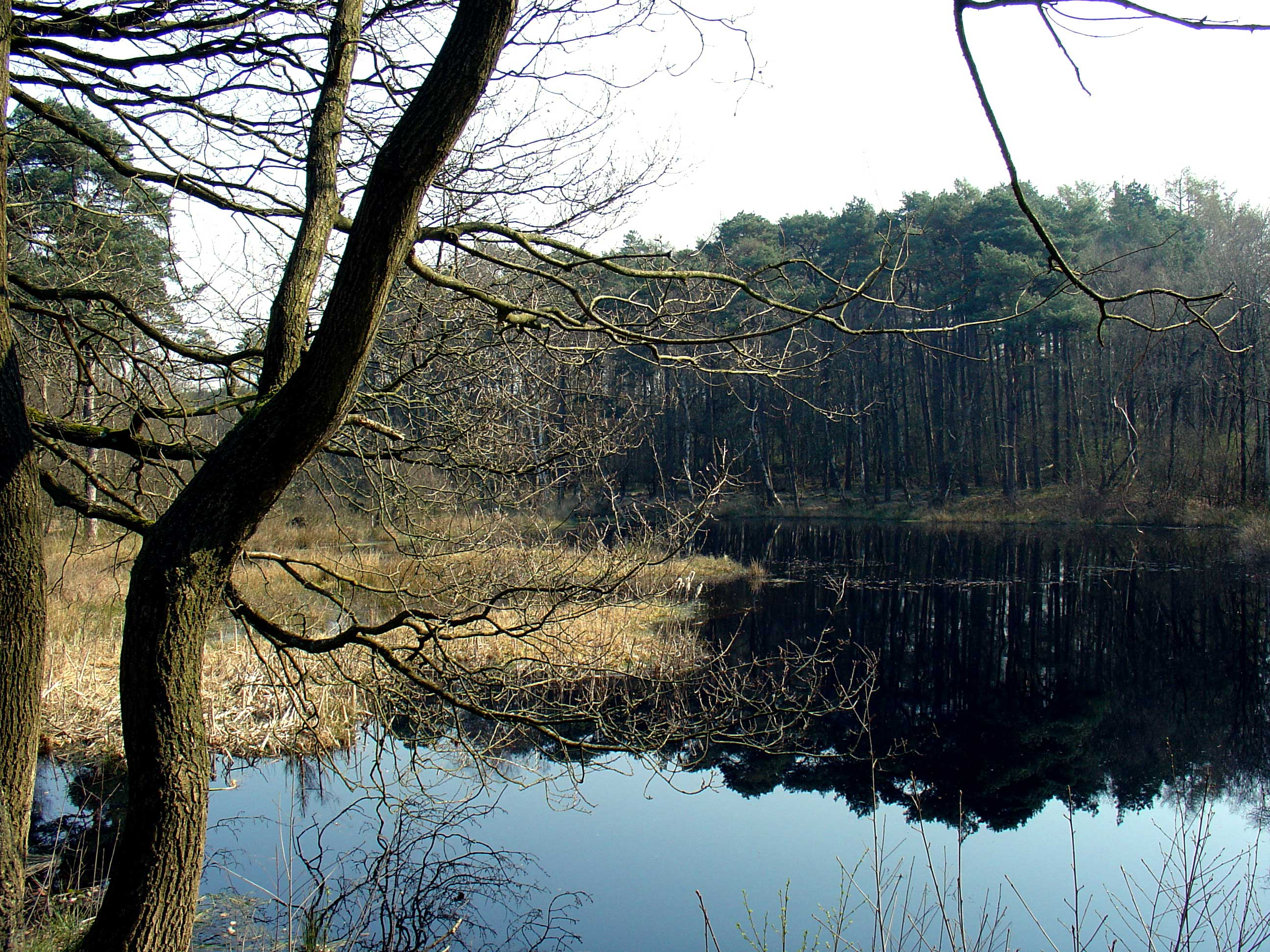 Kampsheide nabij Rolde in de provincie Drenthe